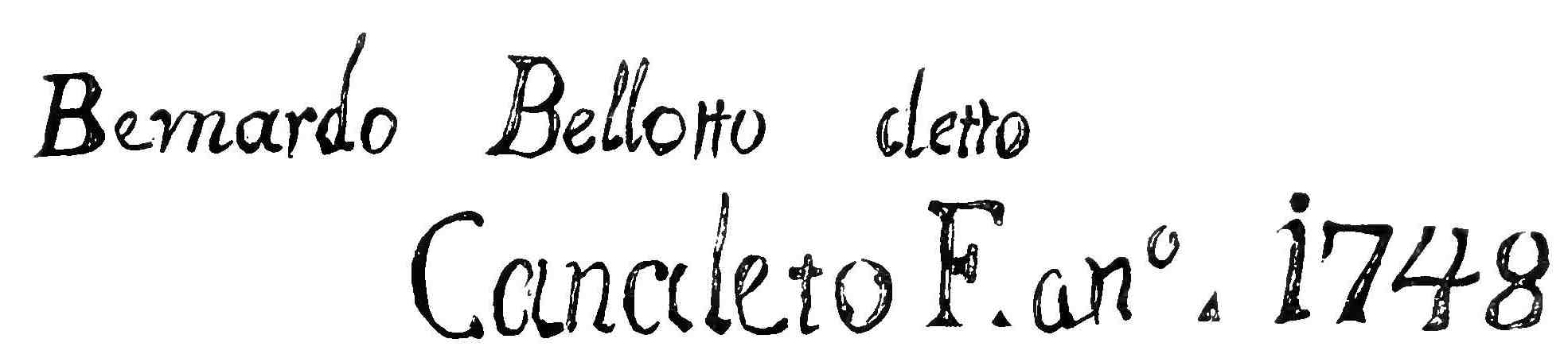 Bildbezeichnung aus: Katalog der Königlichen Gemäldegalerie zu Dresden. Herausgegeben von der Generaldirection der Königlichen Sammlungen für Kunst und Wissenschaft. Druck von Wilhelm Hoffmann. Dresden, Seite 206